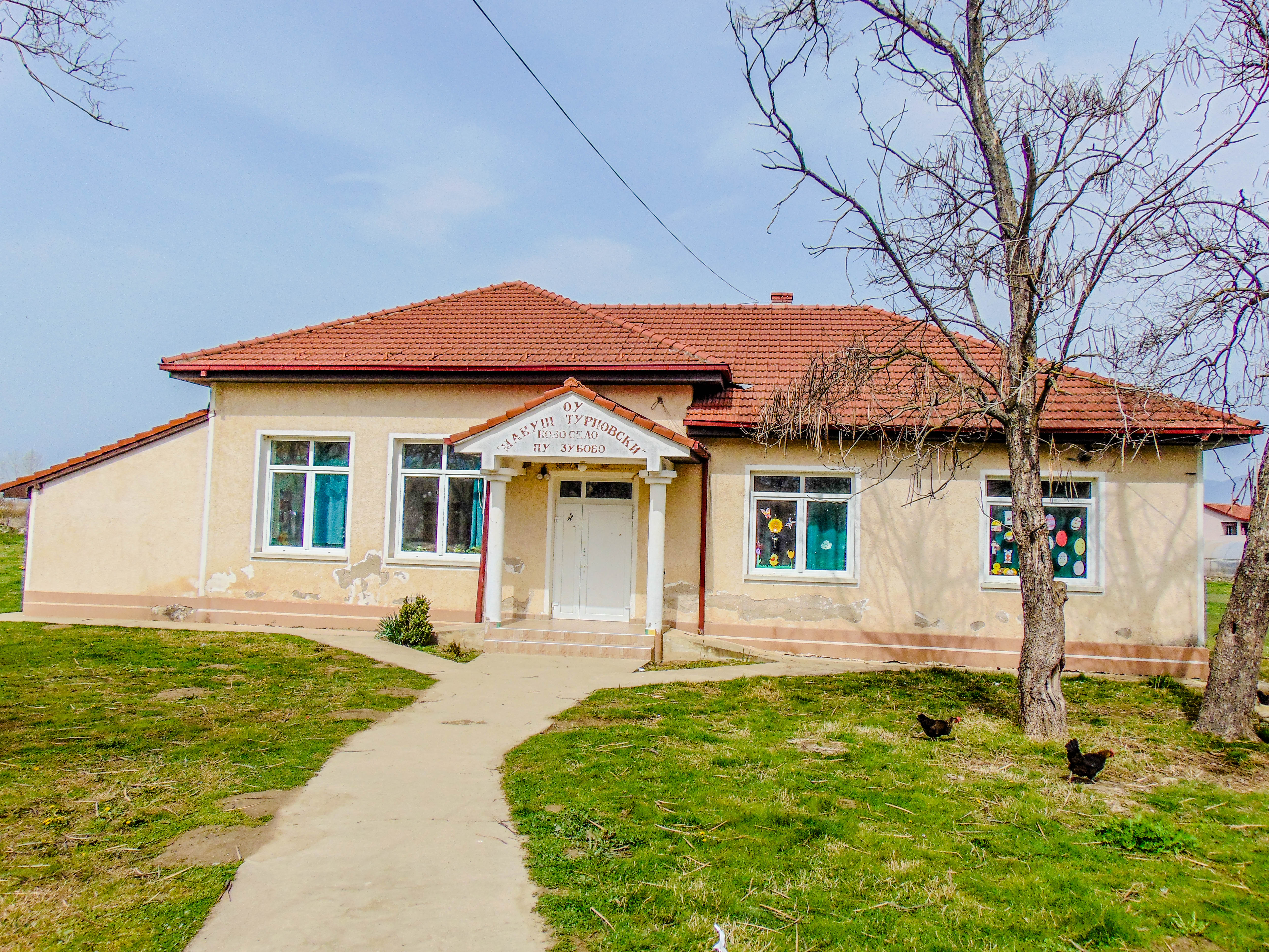 ОУ „Мануш Турновски“ - Зубово